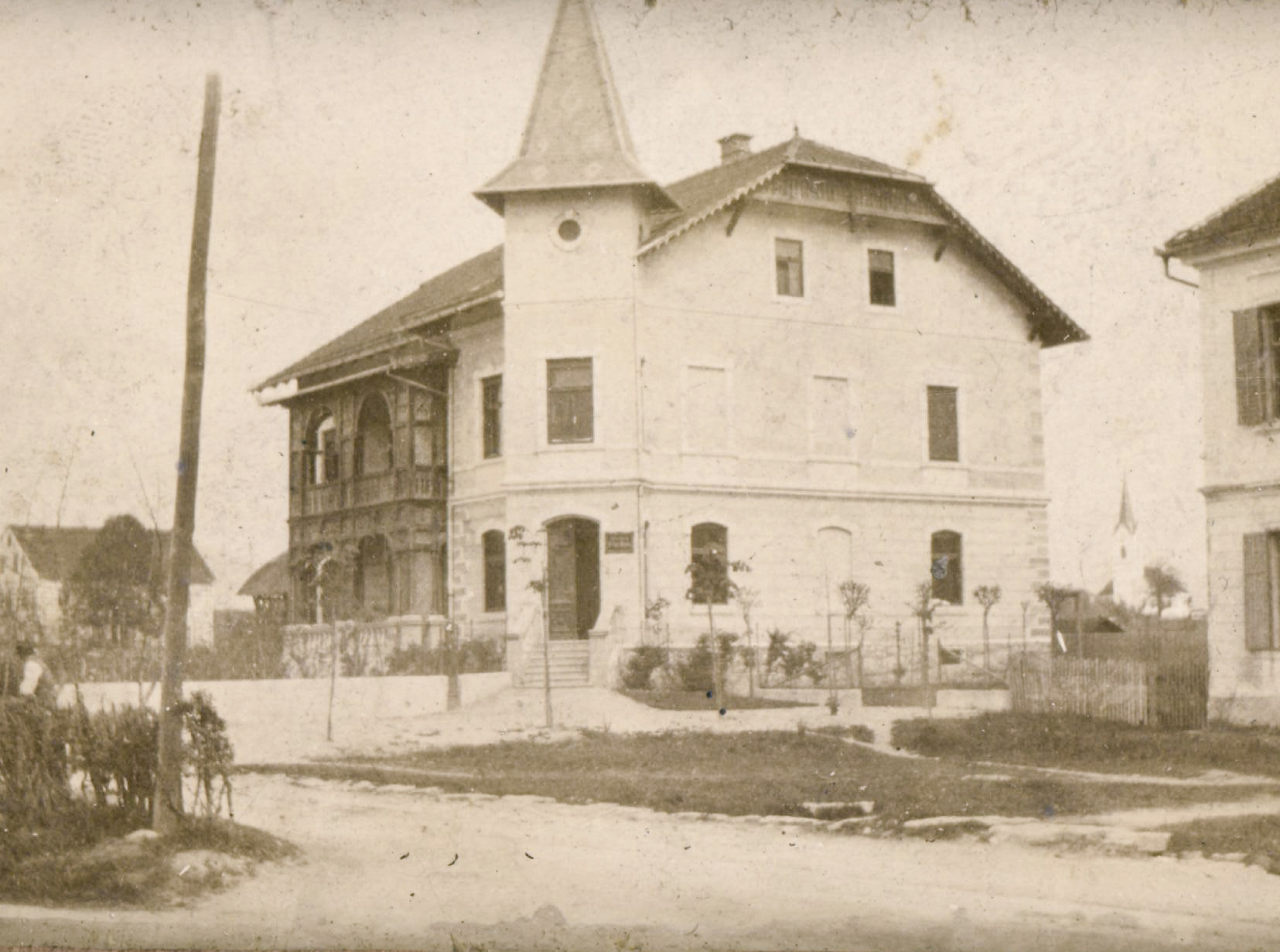 Vila Mayer ob prelomu stoletja.